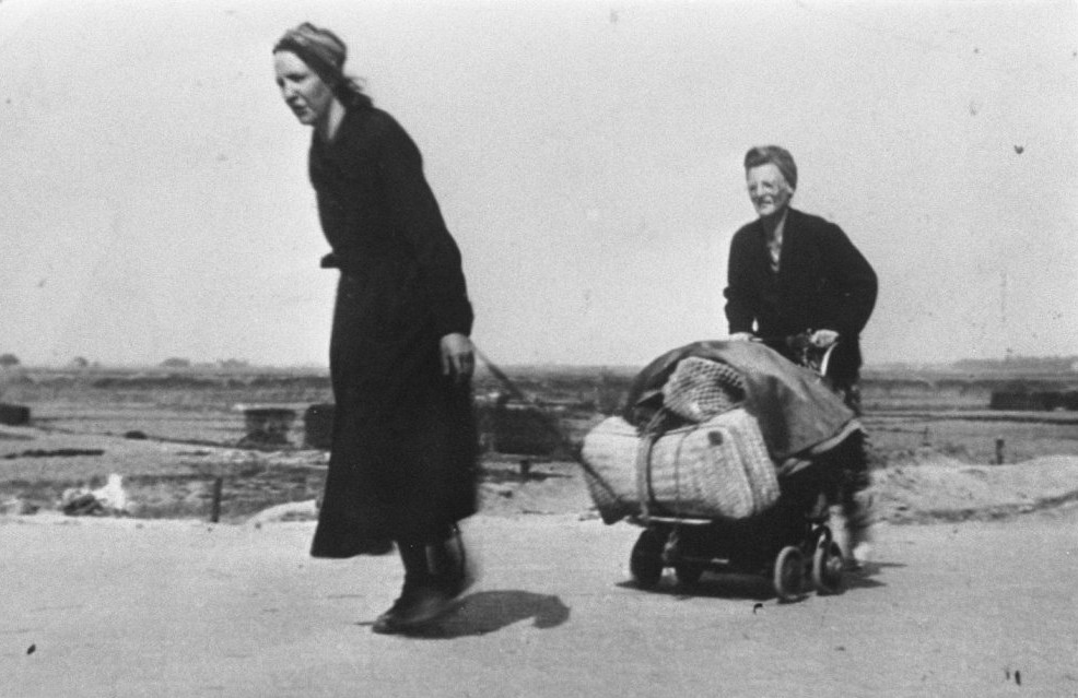 Twee deelnemers aan de hongertochten tijdens de hongerwinter